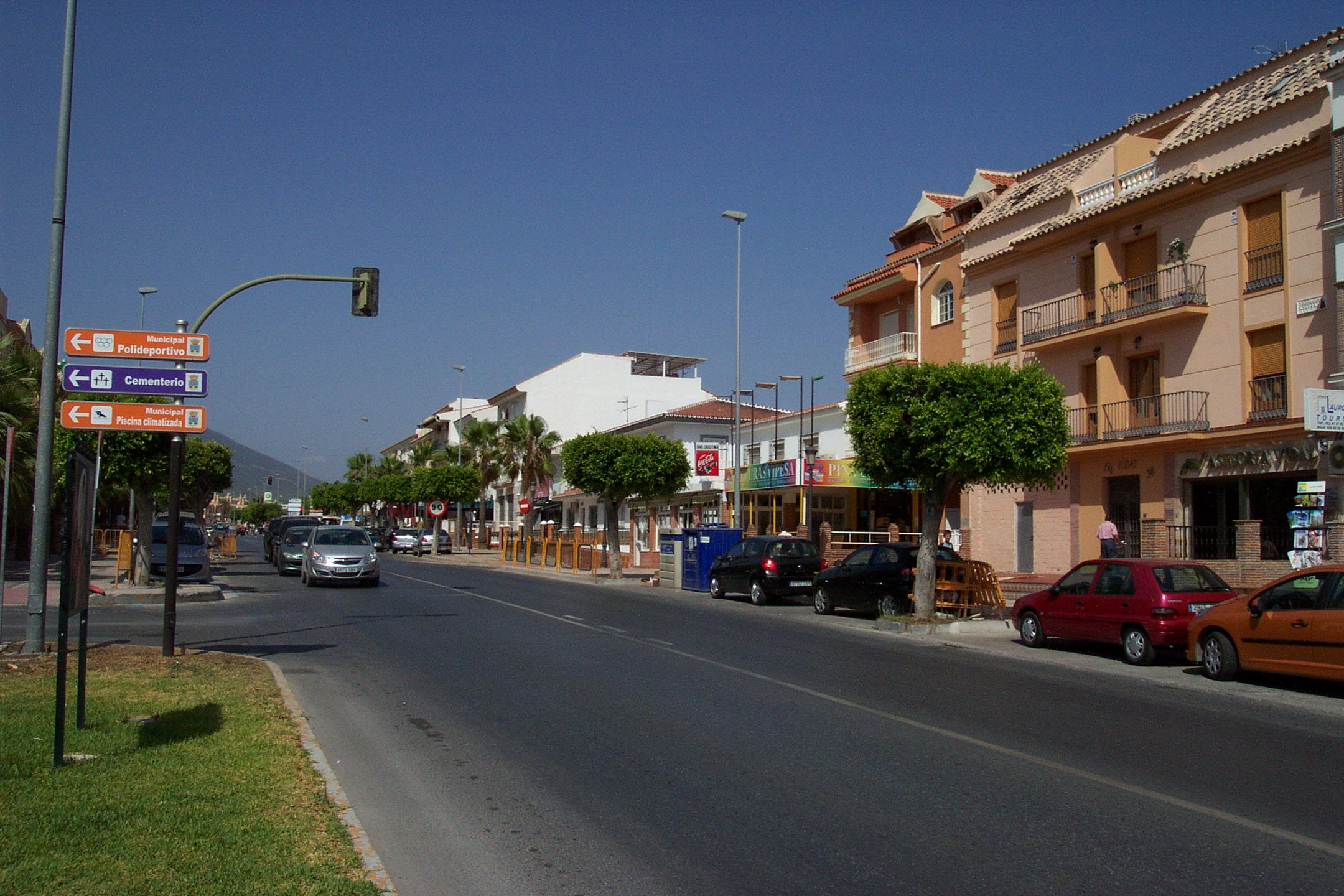 Alhaurín de la Torre, Spain.